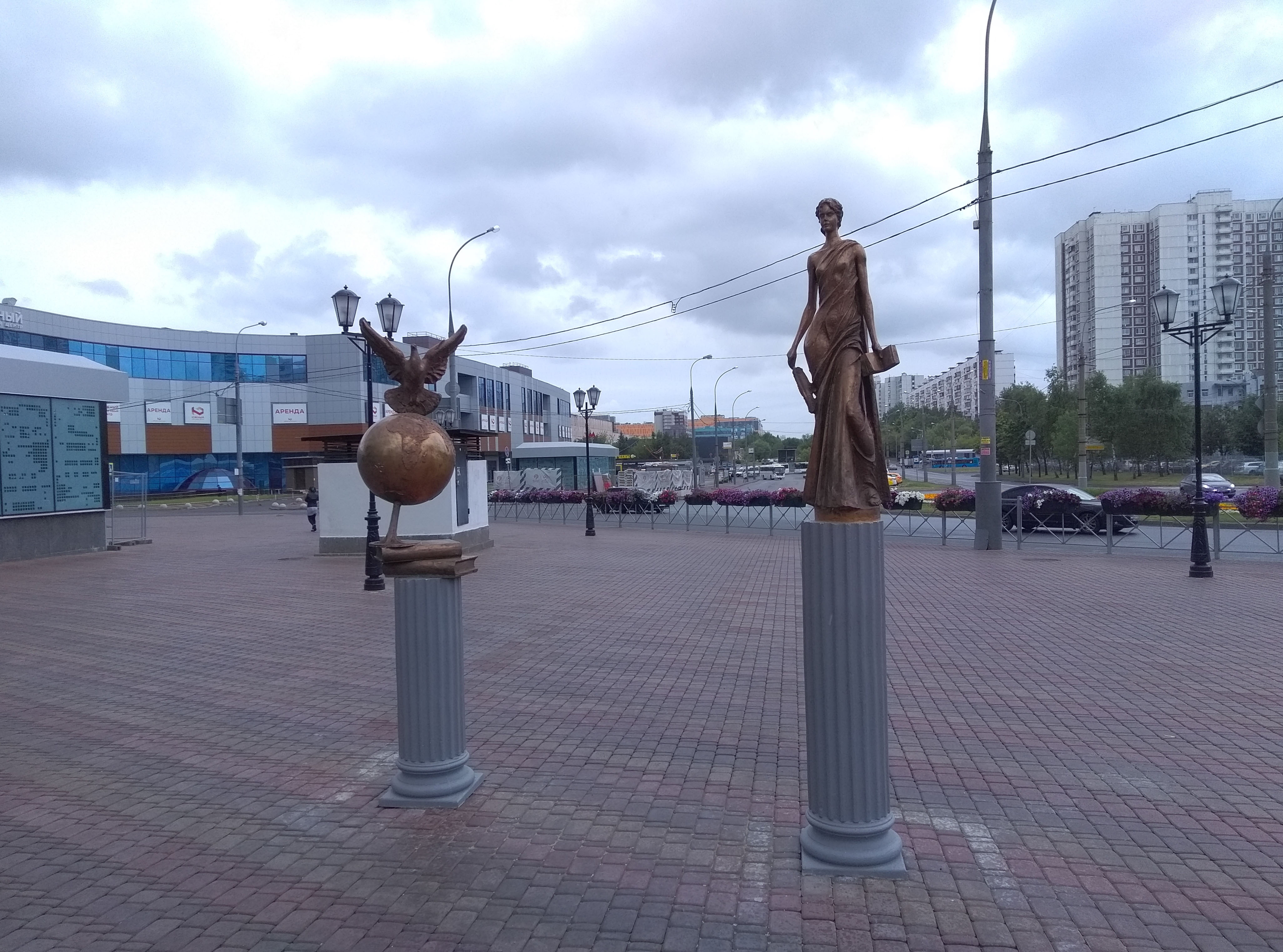 Скульптуры рядом с метро Южная, район Чертаново Северное, Москва.